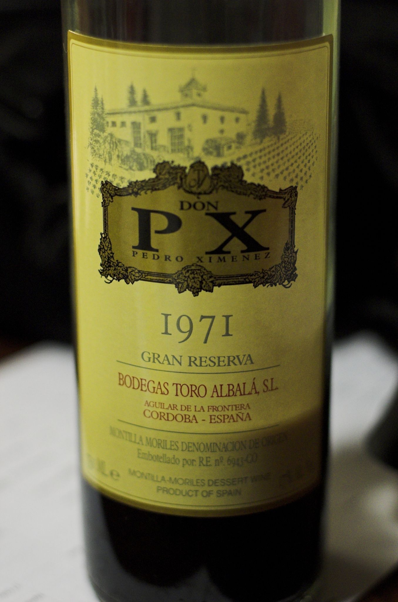 A Spanish dessert wine